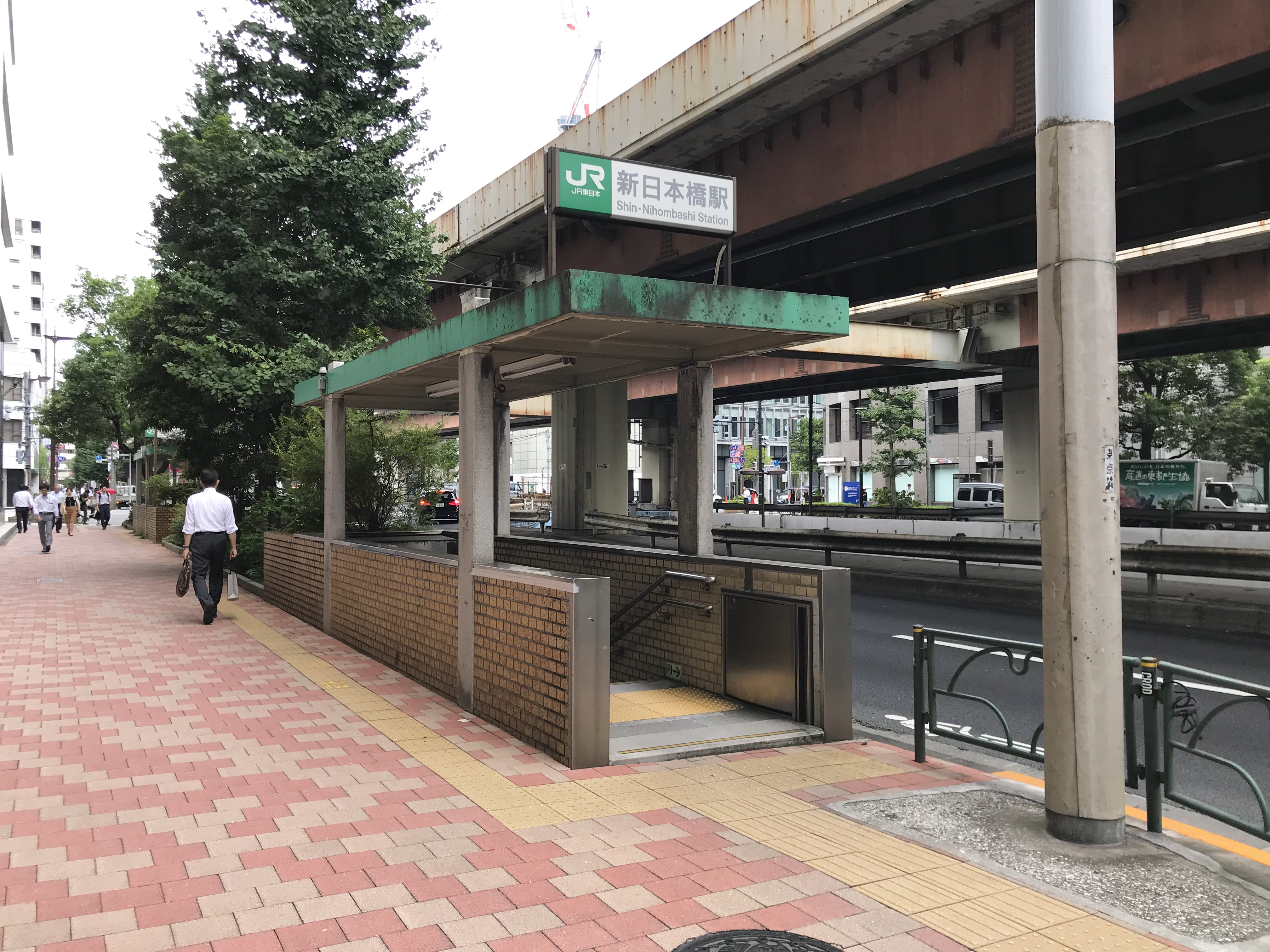 JR東日本総武快速線新日本橋駅5番出入口